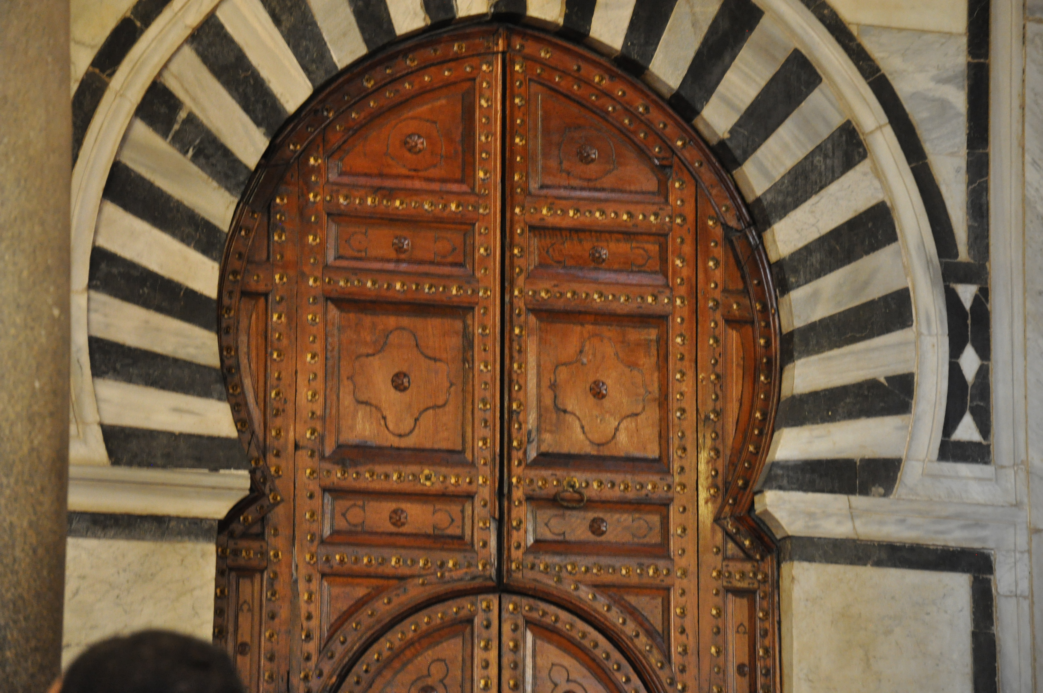 Grande Mosquée (Djamaa Zitouna)